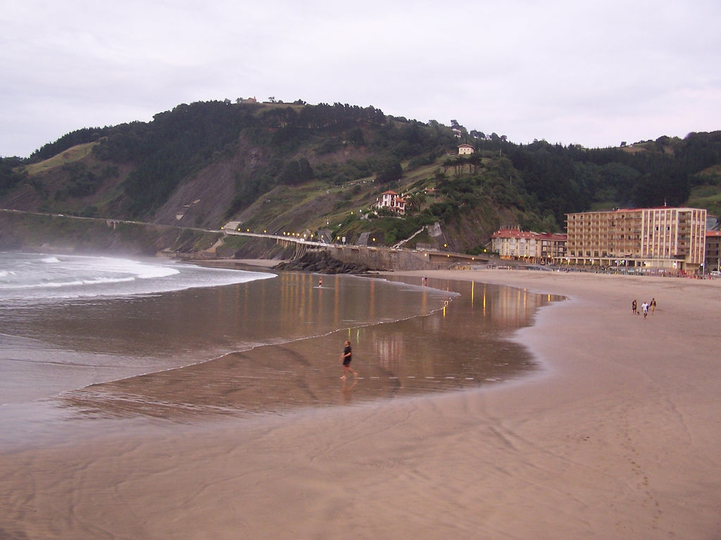 Debako Hondartza